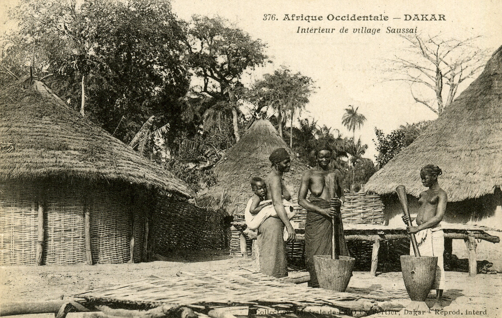 Afrique Occidentale - Intérieur de village saussai (socé ou sossé)